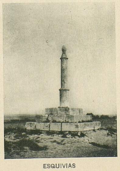 Rollo de Esquivias